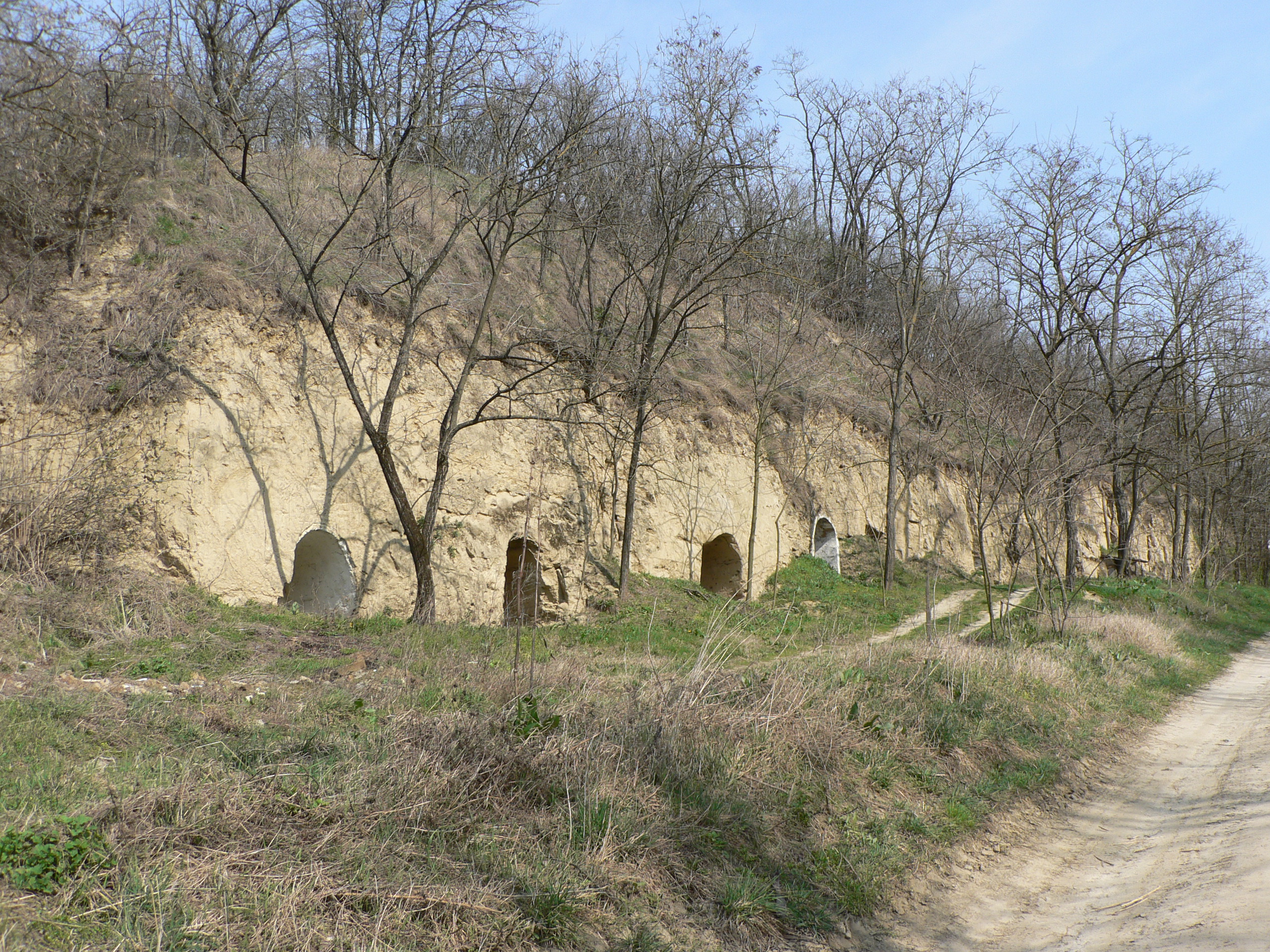 Löszbevájt pincesor Felsőnyéken (Tolna megye, Magyarország)